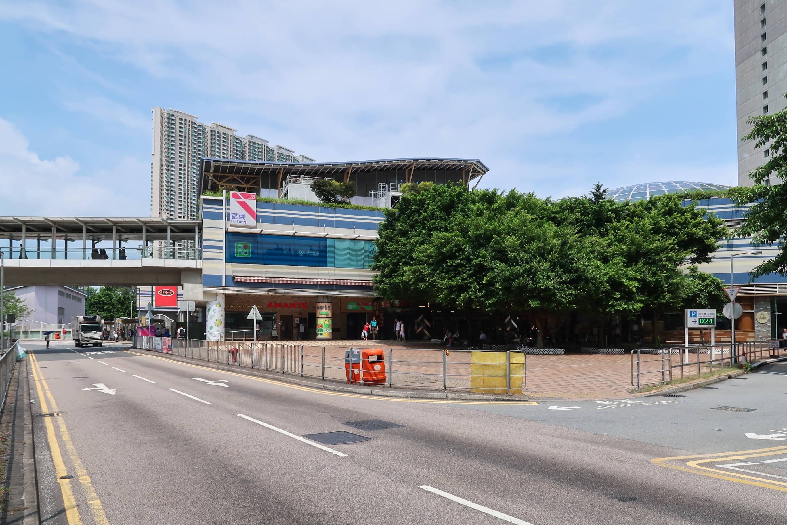 Fu Tung Plaza